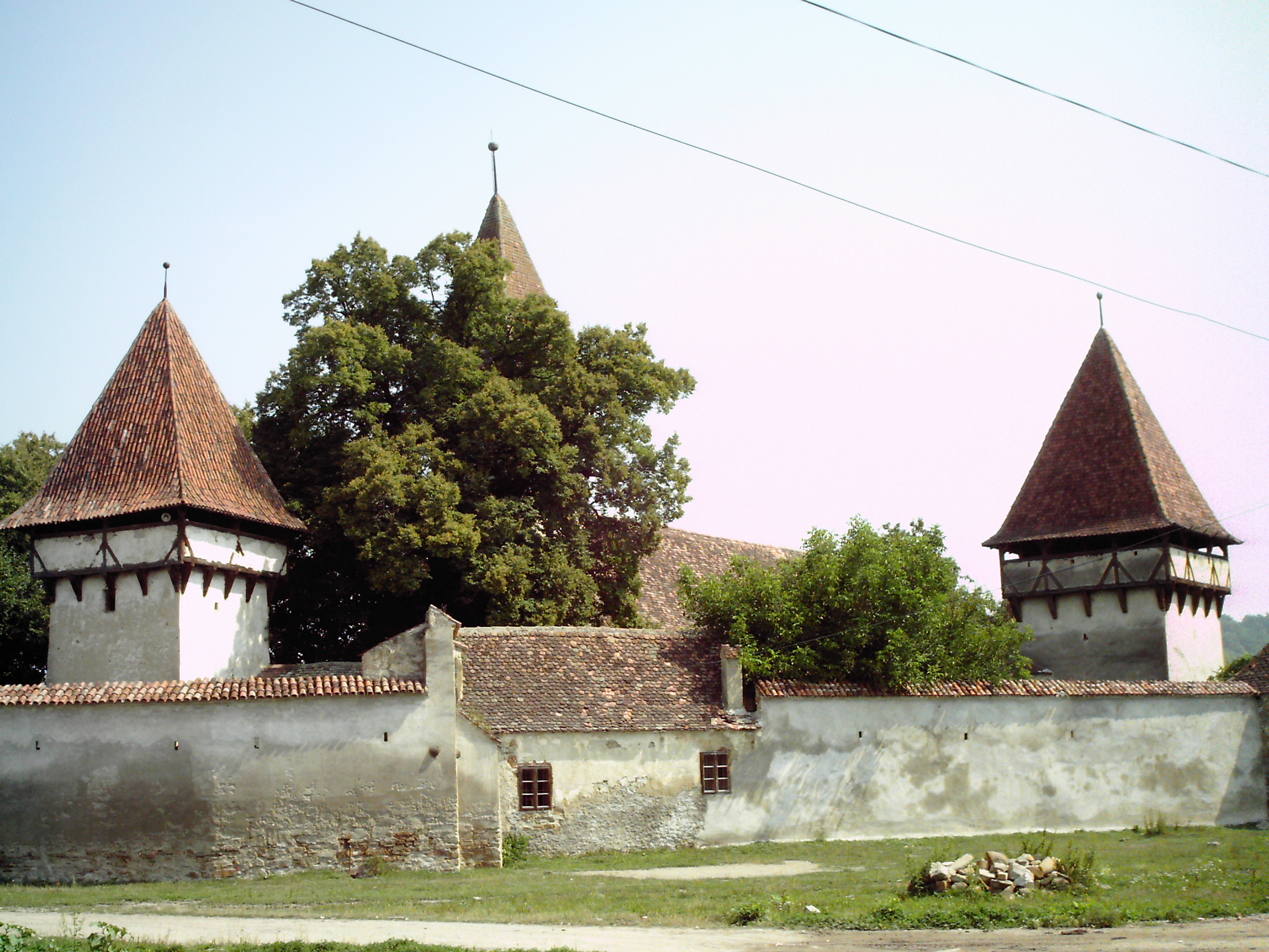 Saxon citadel in Cincsor, Transylvania Romania